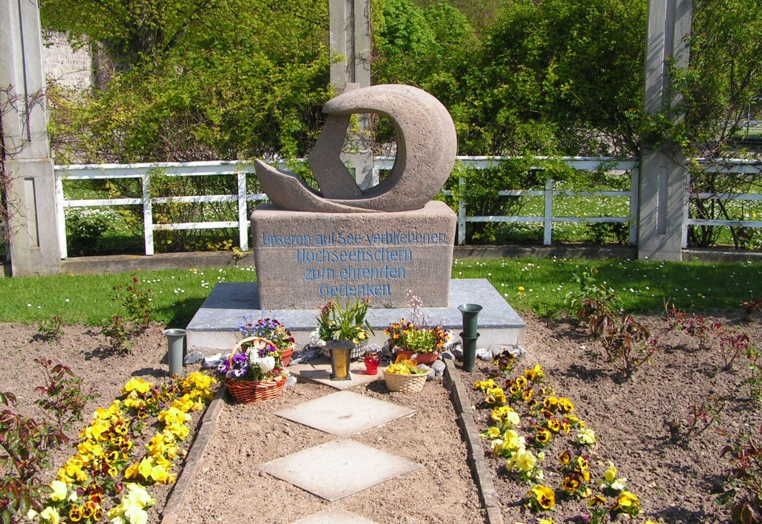 Denkmal für die auf See gebliebenen Hochseefischer